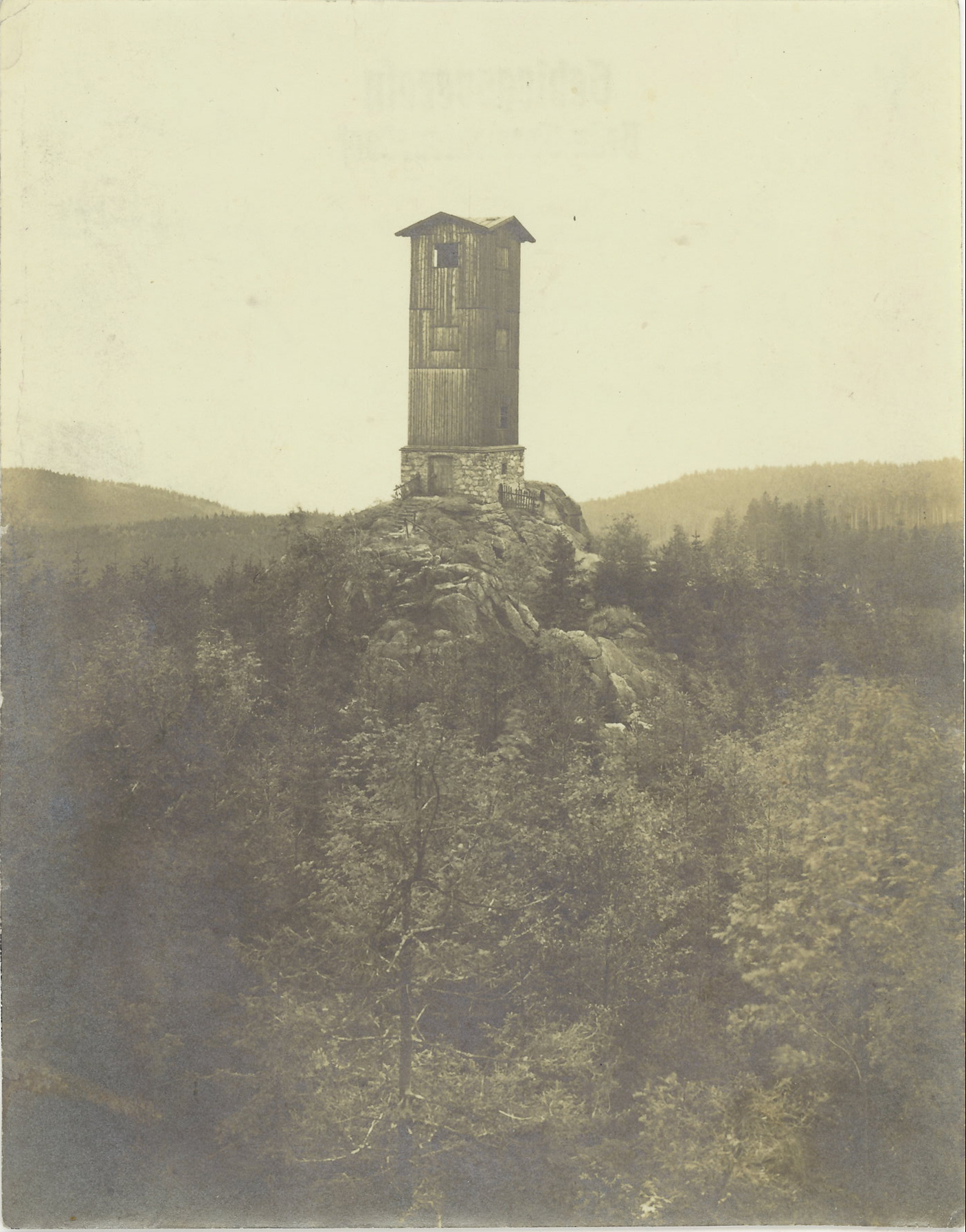 Rozhledna Jeřabina v roce 1912.